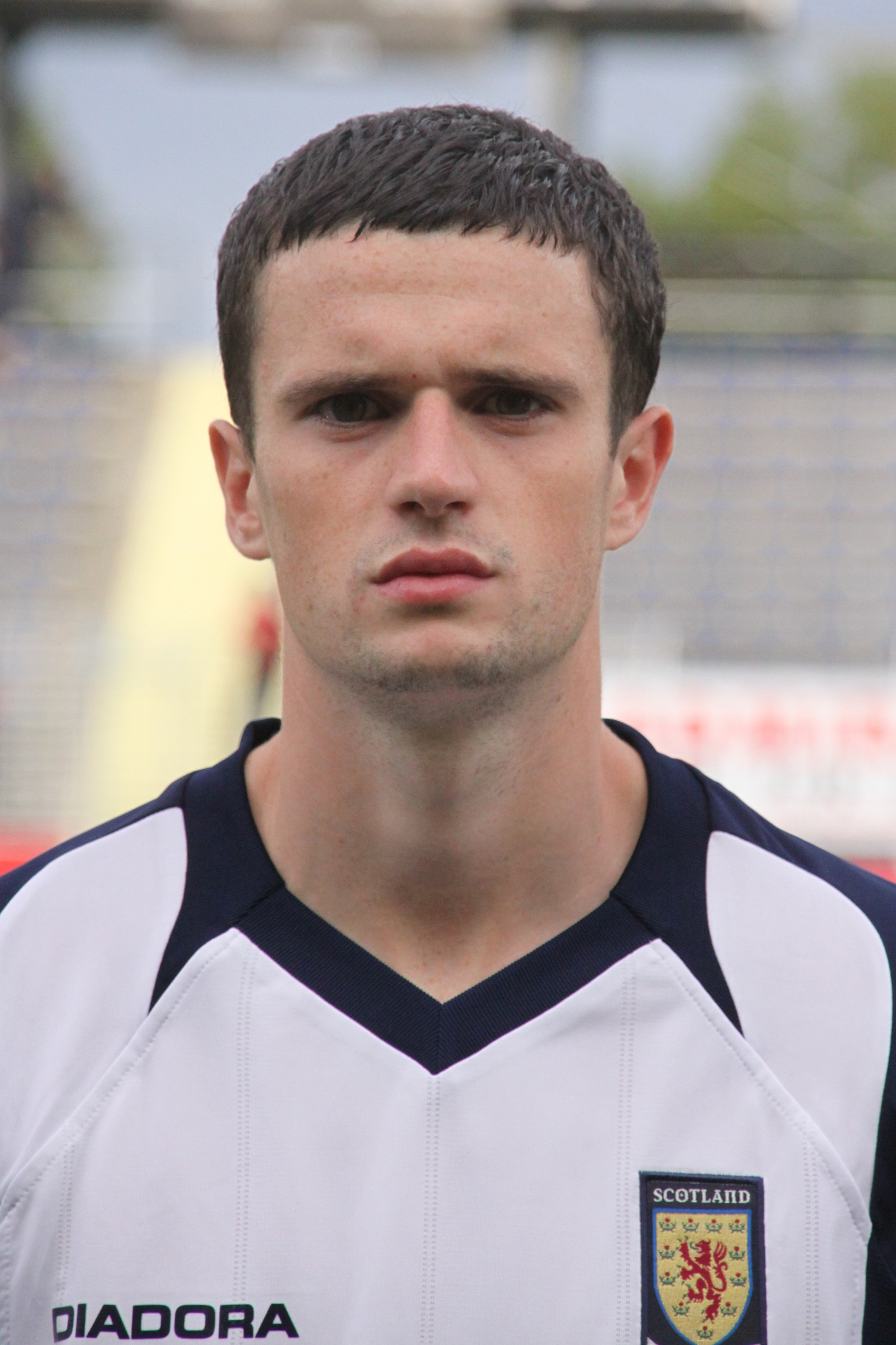 Jamie Murphy (FC Motherwell) - Schottische Fußballnationalmannschaft (U-21-Männer) Jamie Murphy (Motherwell F.C.) - Scotland national under-21 football team — (1)